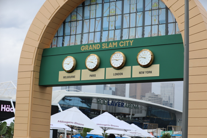 2019 Australian Open